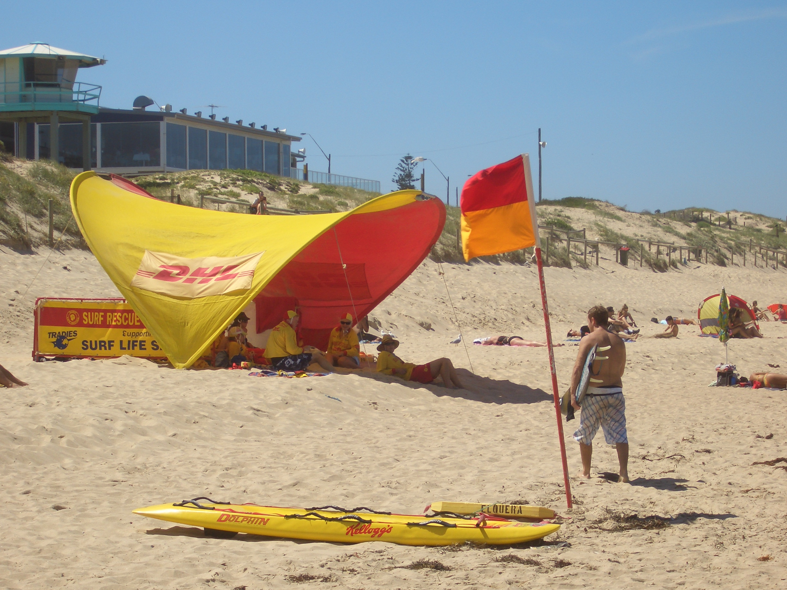 Elouera Beach Lifesavers